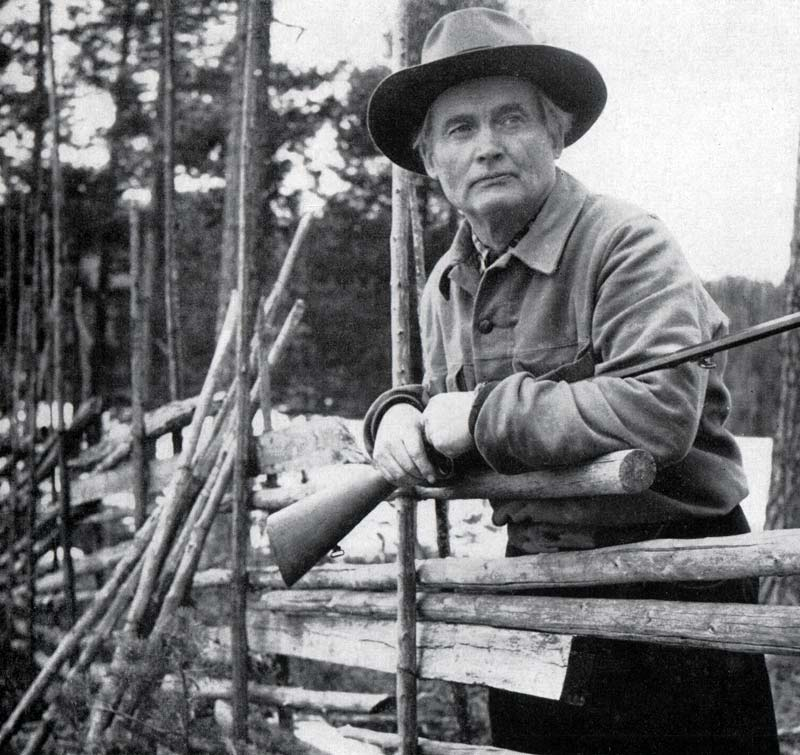 Albert Viksten